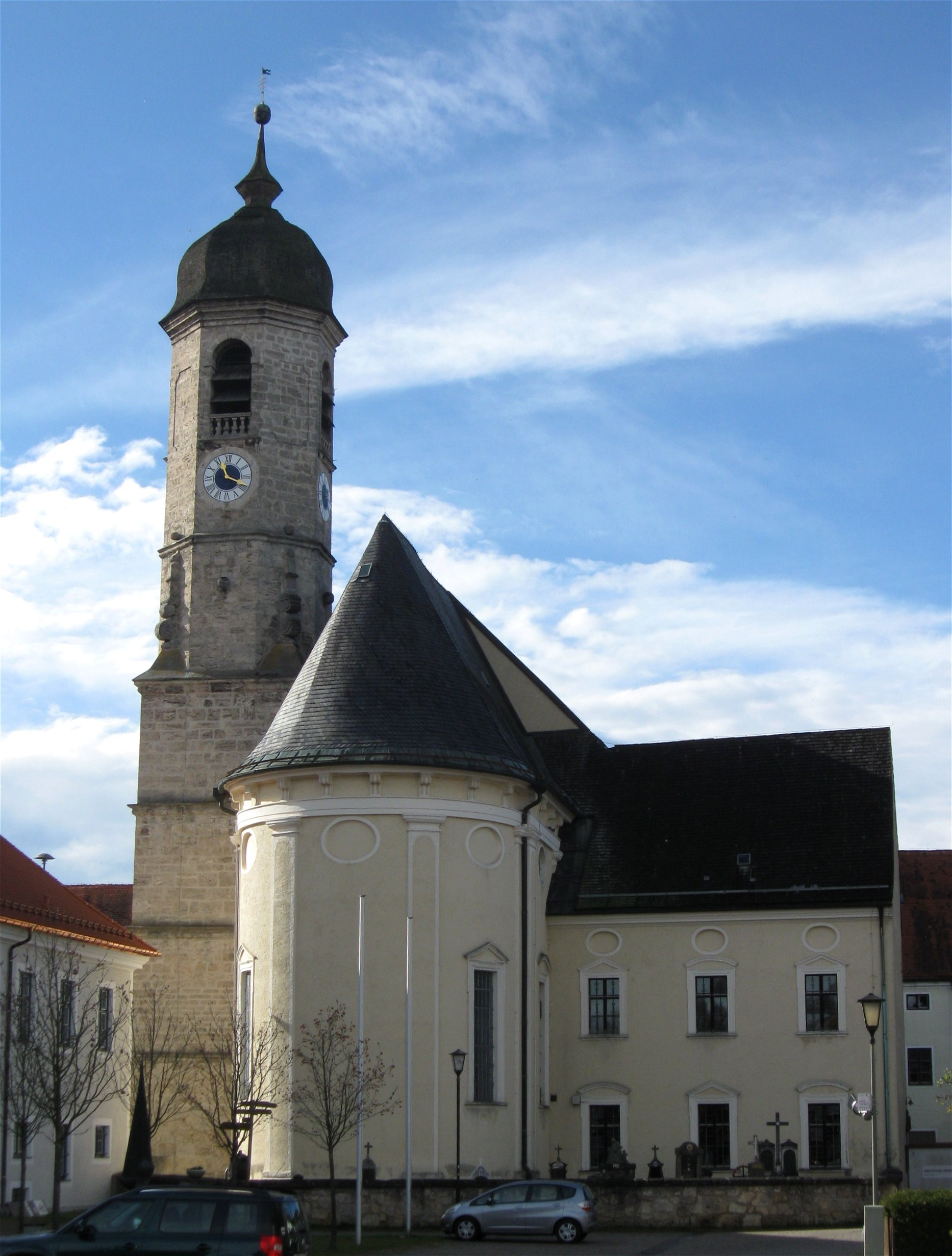 Ignaz-Günther-Straße 3, Weyarn; Ehemalige Augustinerchorherren-Stiftskirche St. Peter und Paul, jetzt Pfarrkirche, Wandpfeilerkirche mit Südturm aus Tuffsteinquadern, barocker Neubau von Lorenzo Sciasca, 1687-1693, Turmunterbau um 1630, Oberteil 1713, nördlich angebaute Sakristei mit darüberliegendem Kapitelsaal, sowie anschließendem Korridorbau mit ehemaligem Kreuzgang, mit Ausstattung. D-1-82-137-5